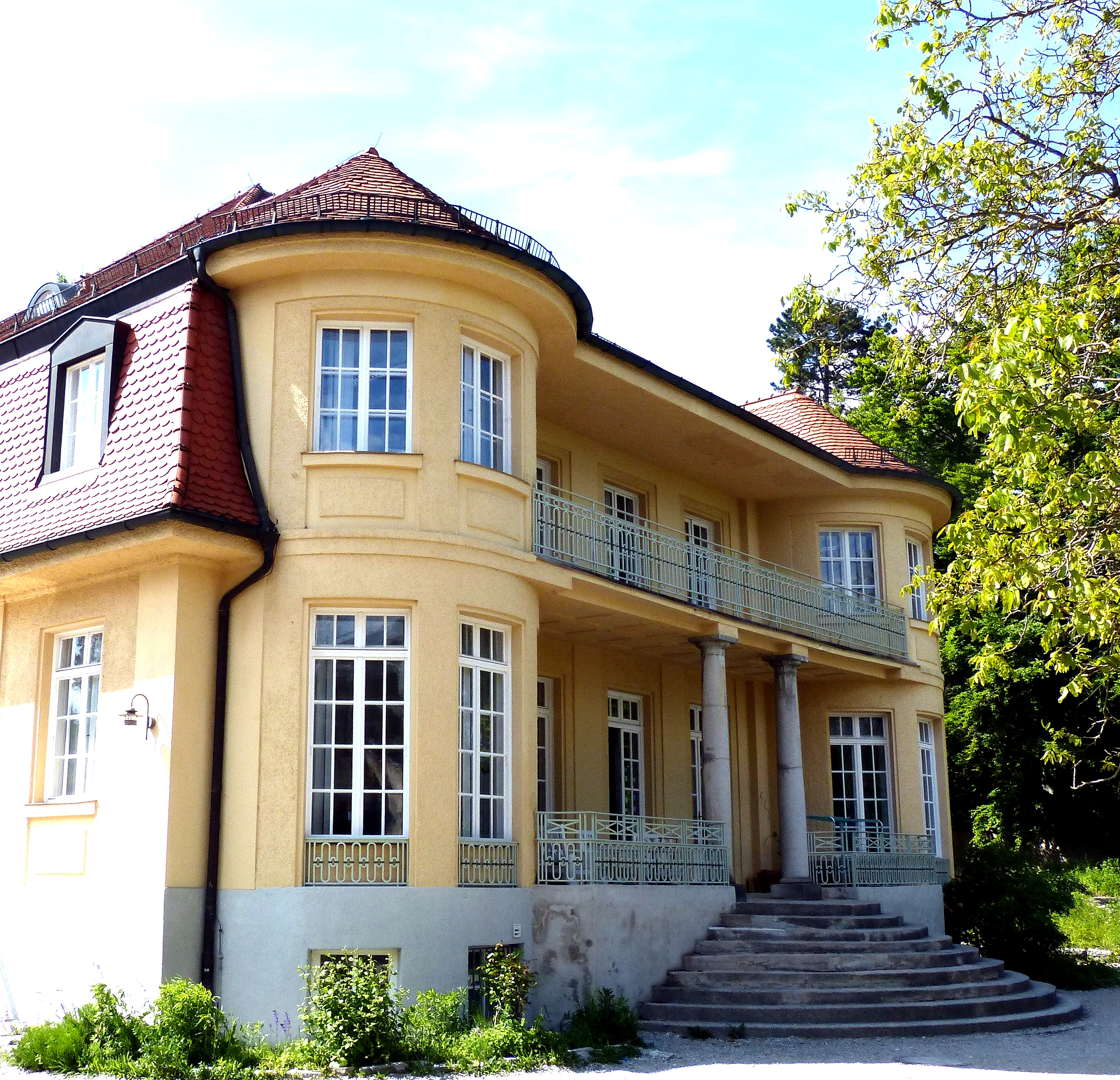 Feldafing, Höhenbergstraße 11. Die Villa Bernheimer, heute eine Grundschule der Gemeinde Feldafing, ist ein erdgeschossiger Mansarddachbau, der 1912/13 im neuklassizistischen Stil erbaut wurde. Bauherr der Villa war Otto Bernheimer, ein erfolgreicher Antiquitätenhändler aus München.